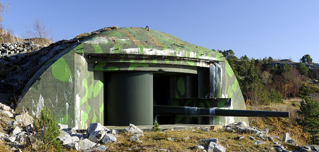 Kanon ved Brettingen fort